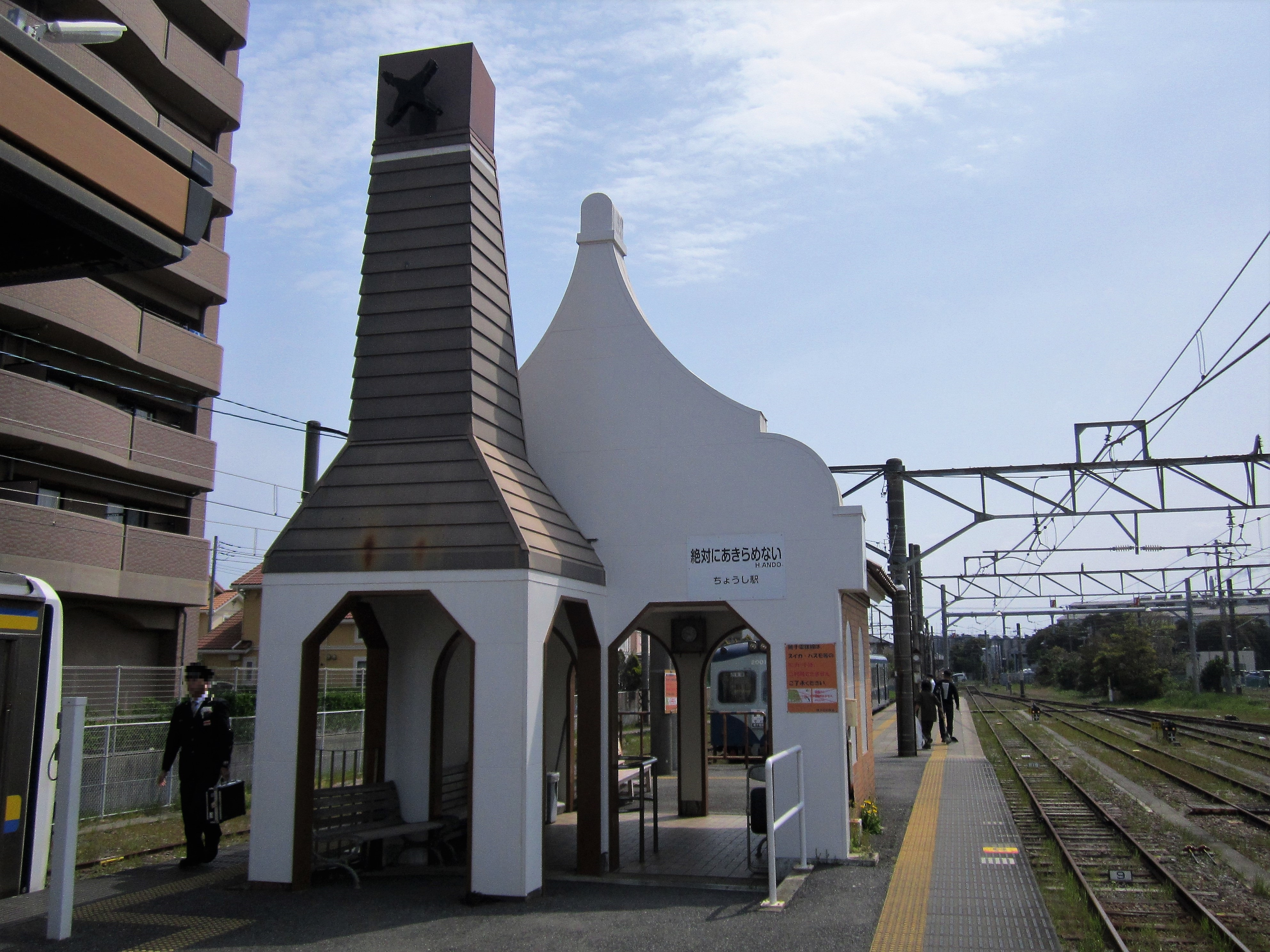 銚子電気鉄道 銚子駅 Canon PowerShot A2200